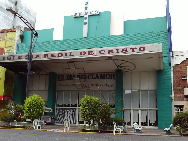 Cine America 17-01-2009